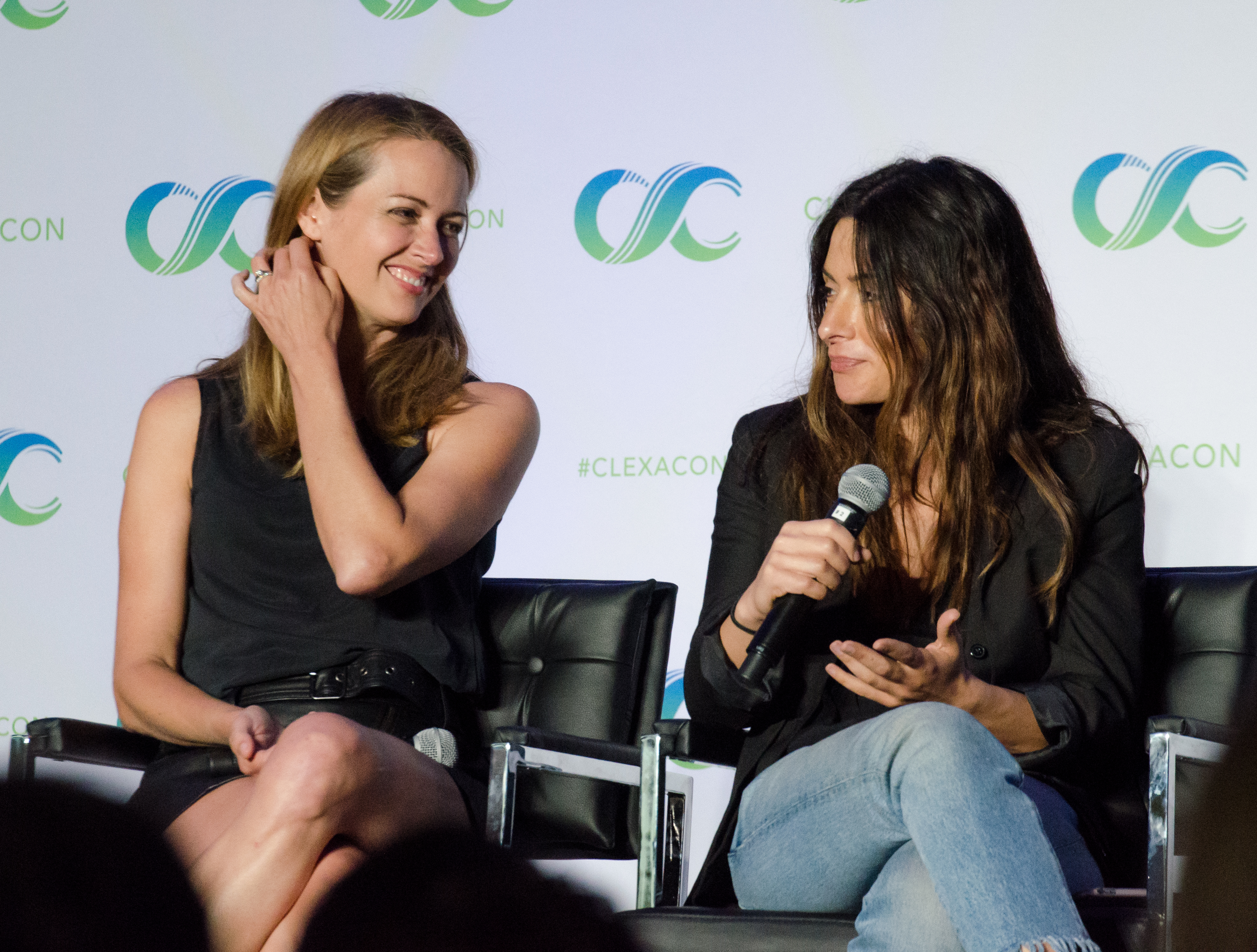 Amy & Sarah [1]